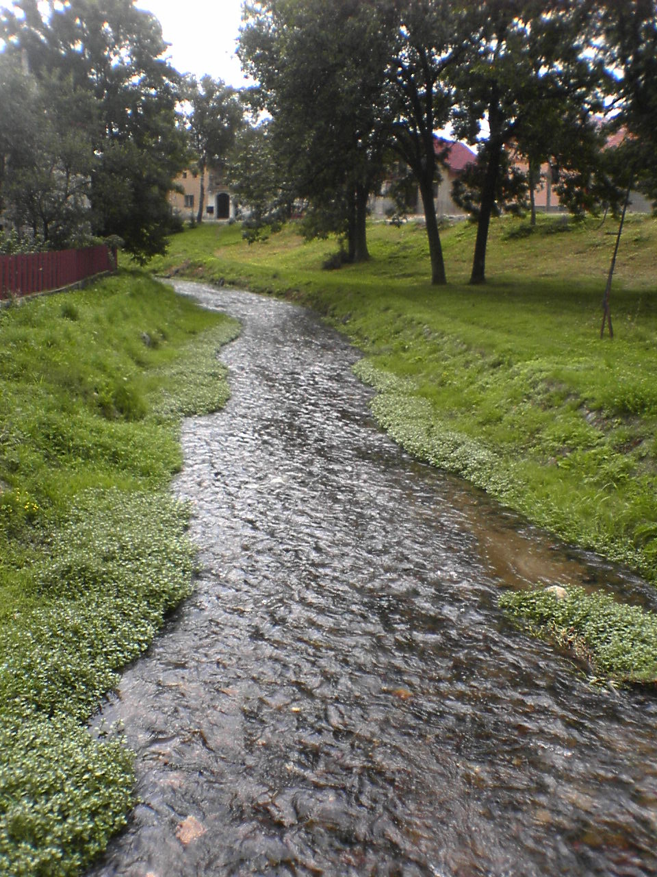 Slavkovský potok in Veľký Slavkov1